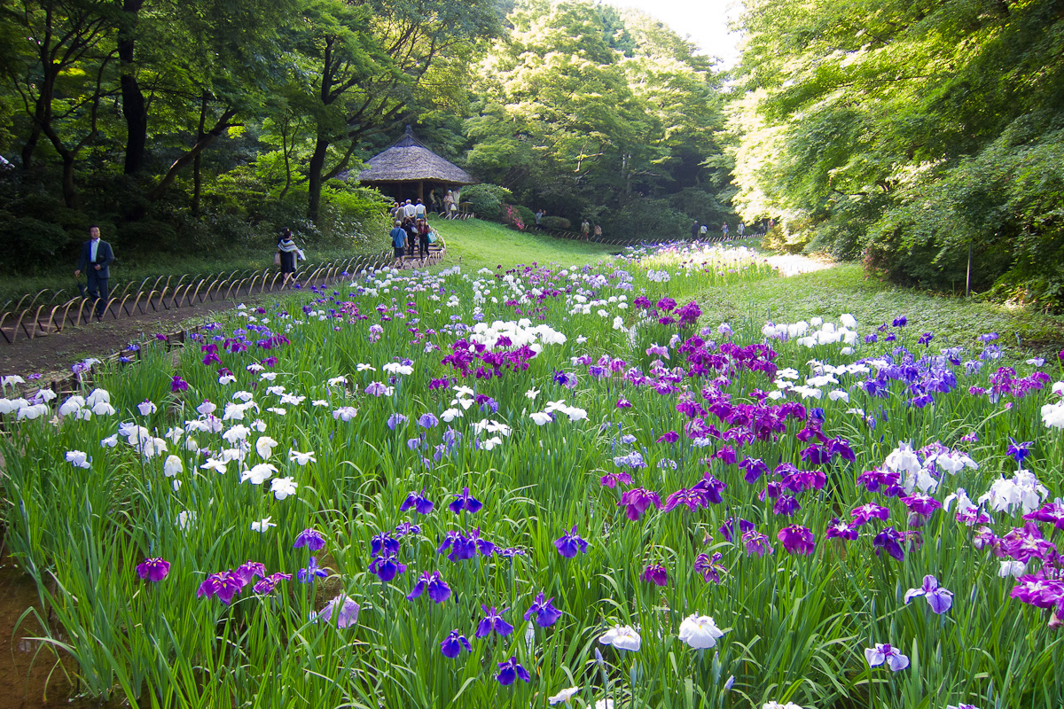 明治神宮御苑、東京都渋谷区。